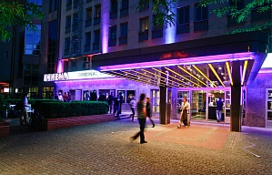 Zeigt den Eingang des CINEMA Filmtheaters in München